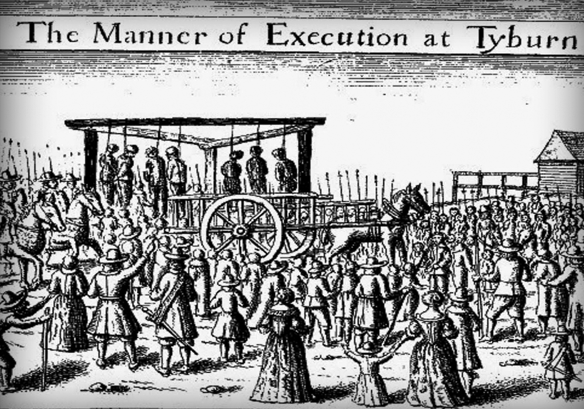 Гравюра предоставляющая тайбернское дерево